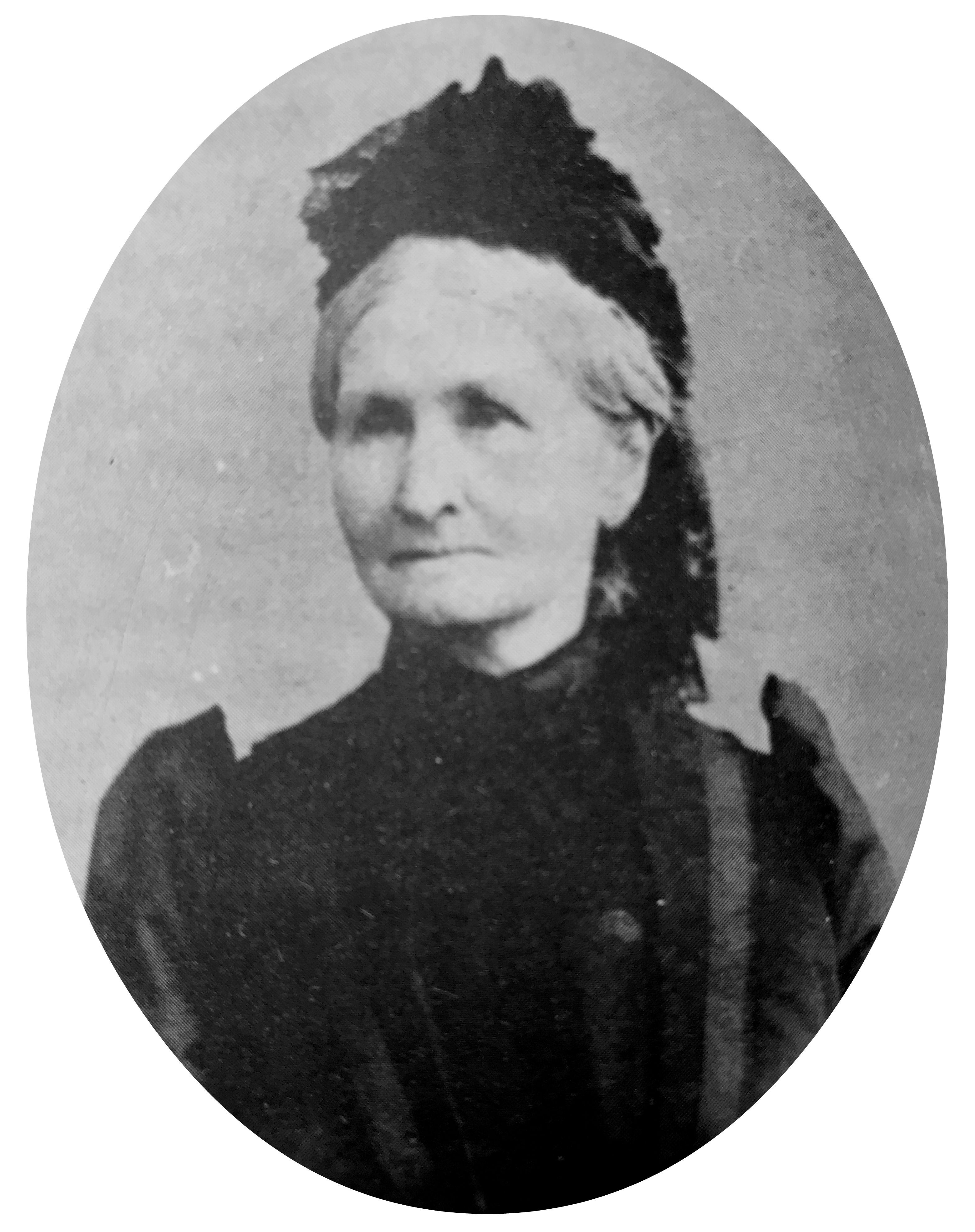 Графиня Елизавета Петровна Коцебу (1818—1902)